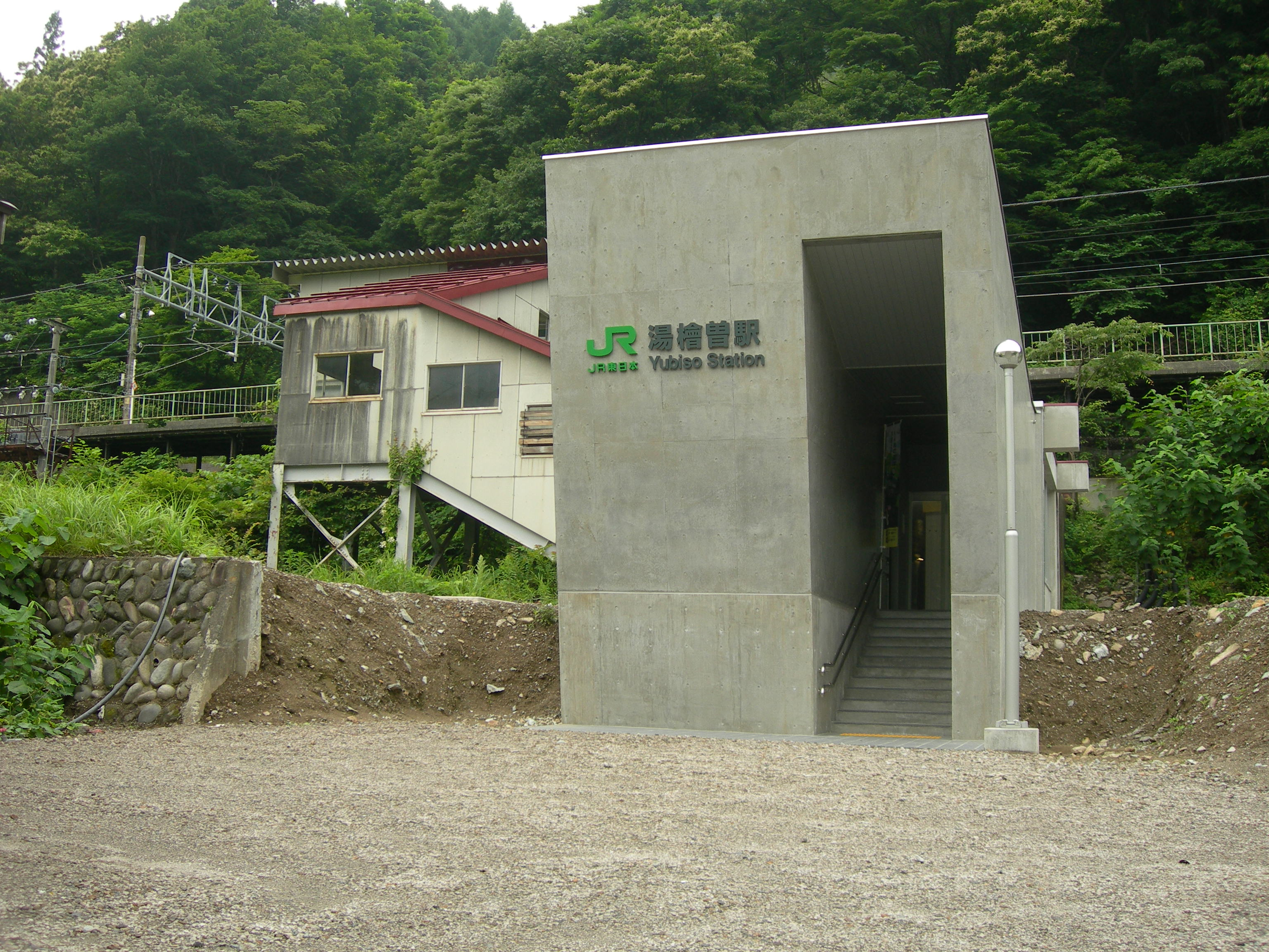 湯檜曽駅